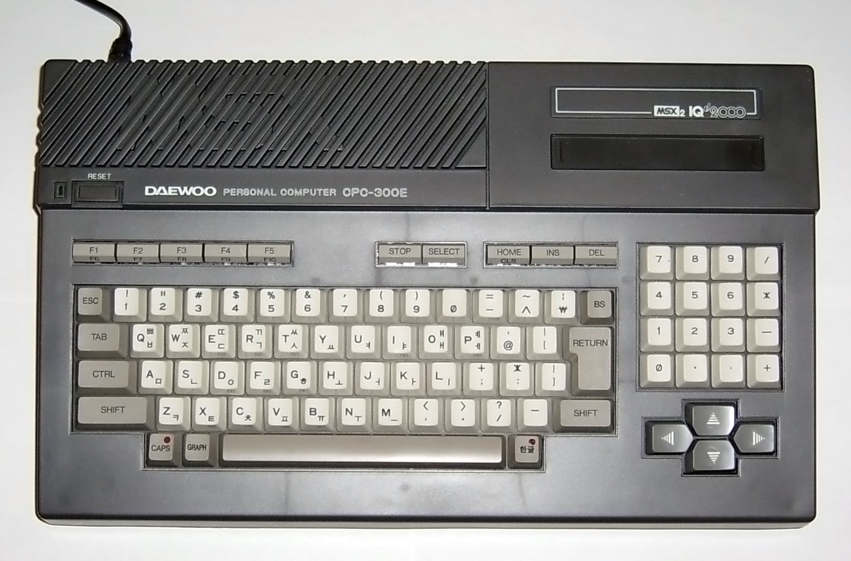 Внешний вид компьютера Daewoo CPC-300E.